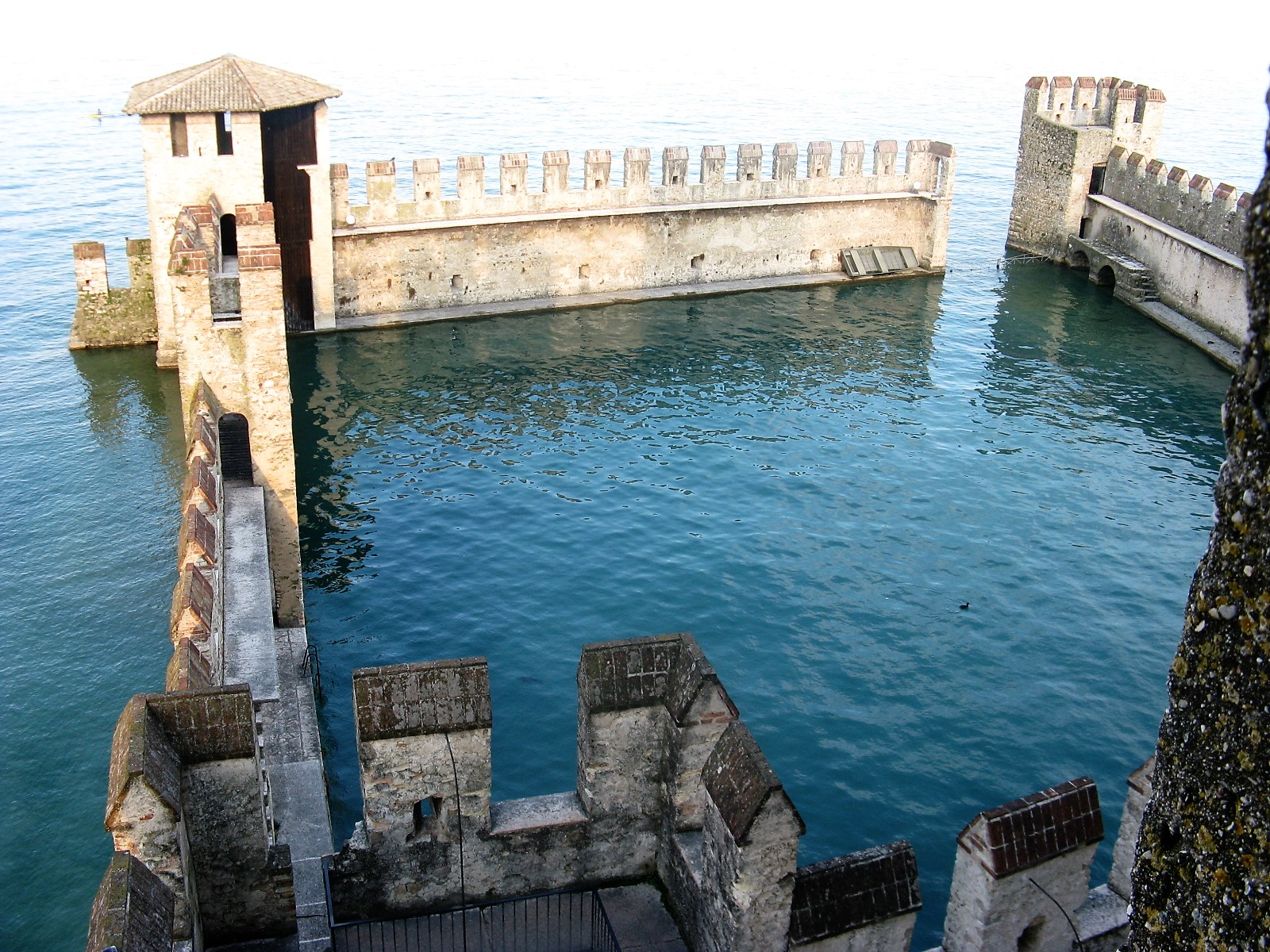 Castello Scaligero (Sirmione) This is a photo of a monument which is part of cultural heritage of Italy.